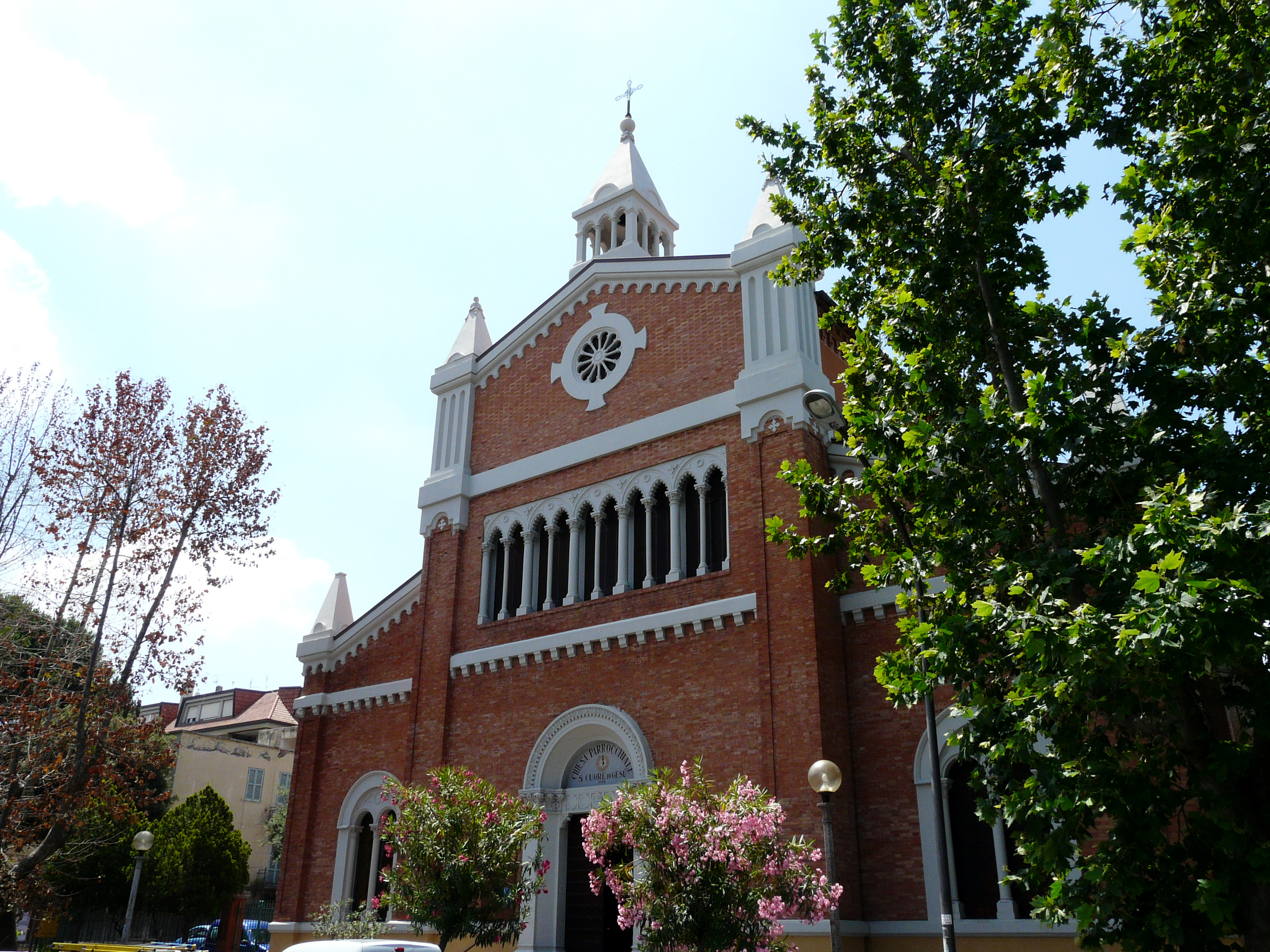 Chiesa Parrocchiale del Sacro Cuore di Gesù - Grottaferrata - Rm